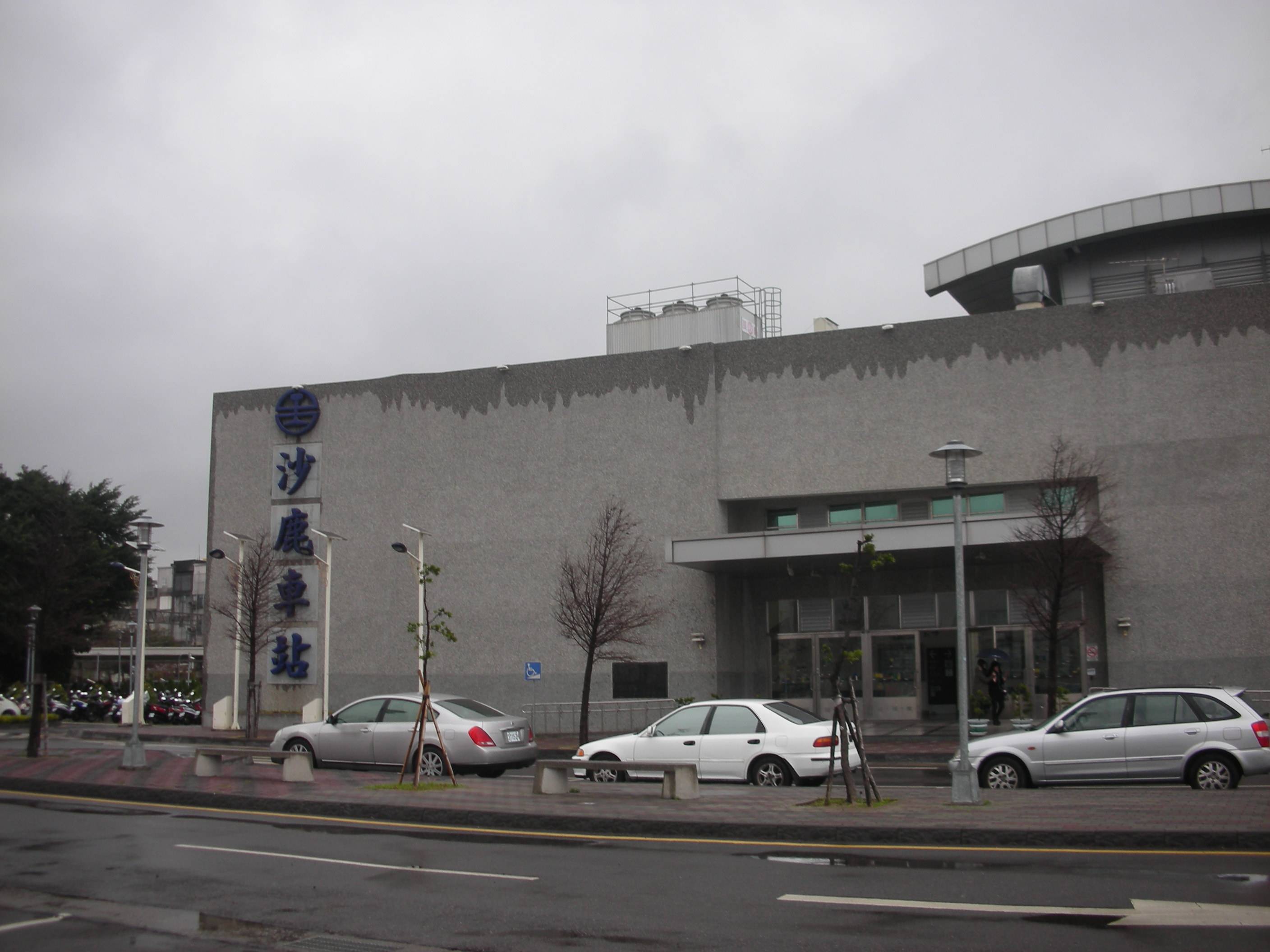 台鐵沙鹿車站。(後站出口)